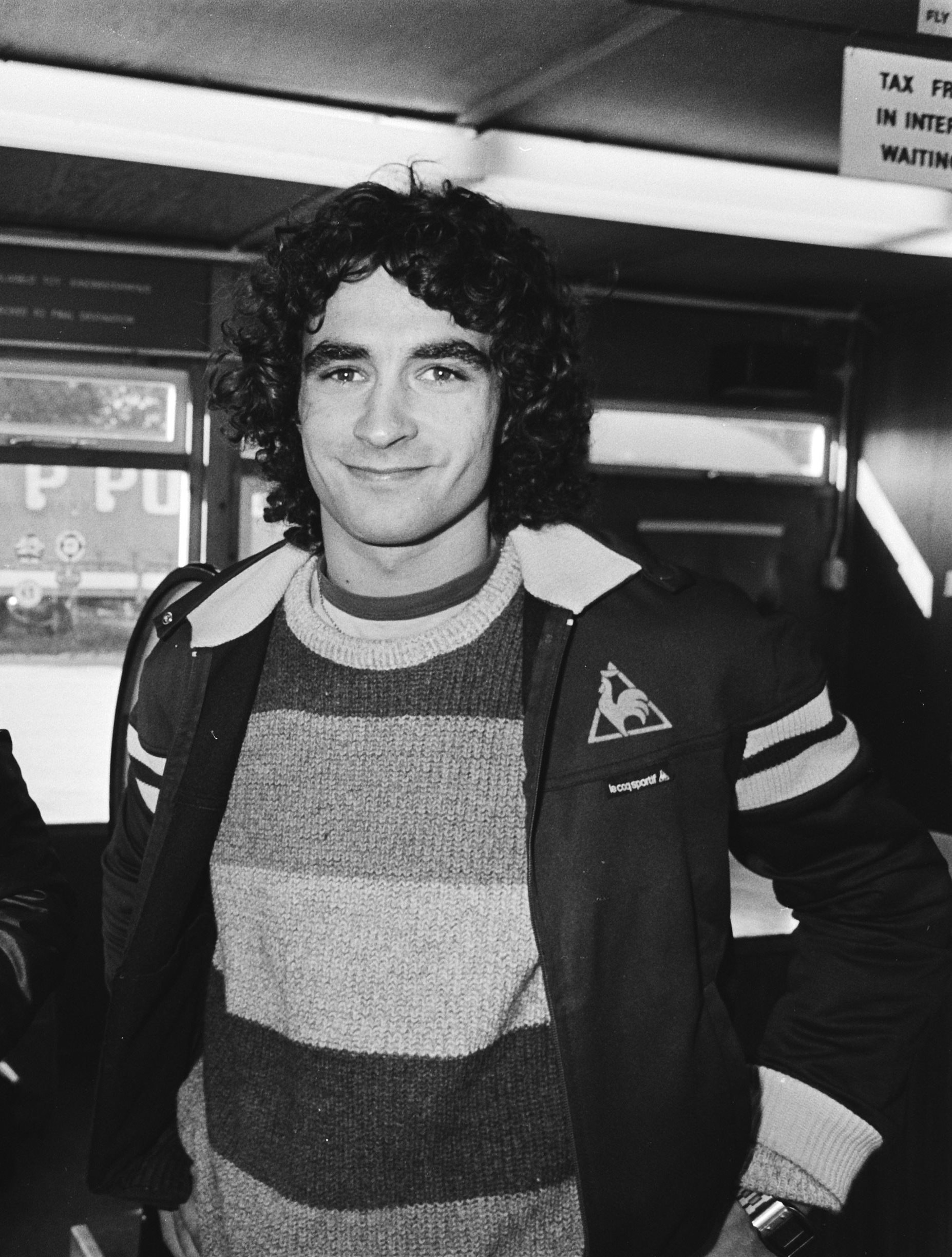 Rocheteau op het vliegveld voor de wedstrijd tussen St. Etienne en PSV